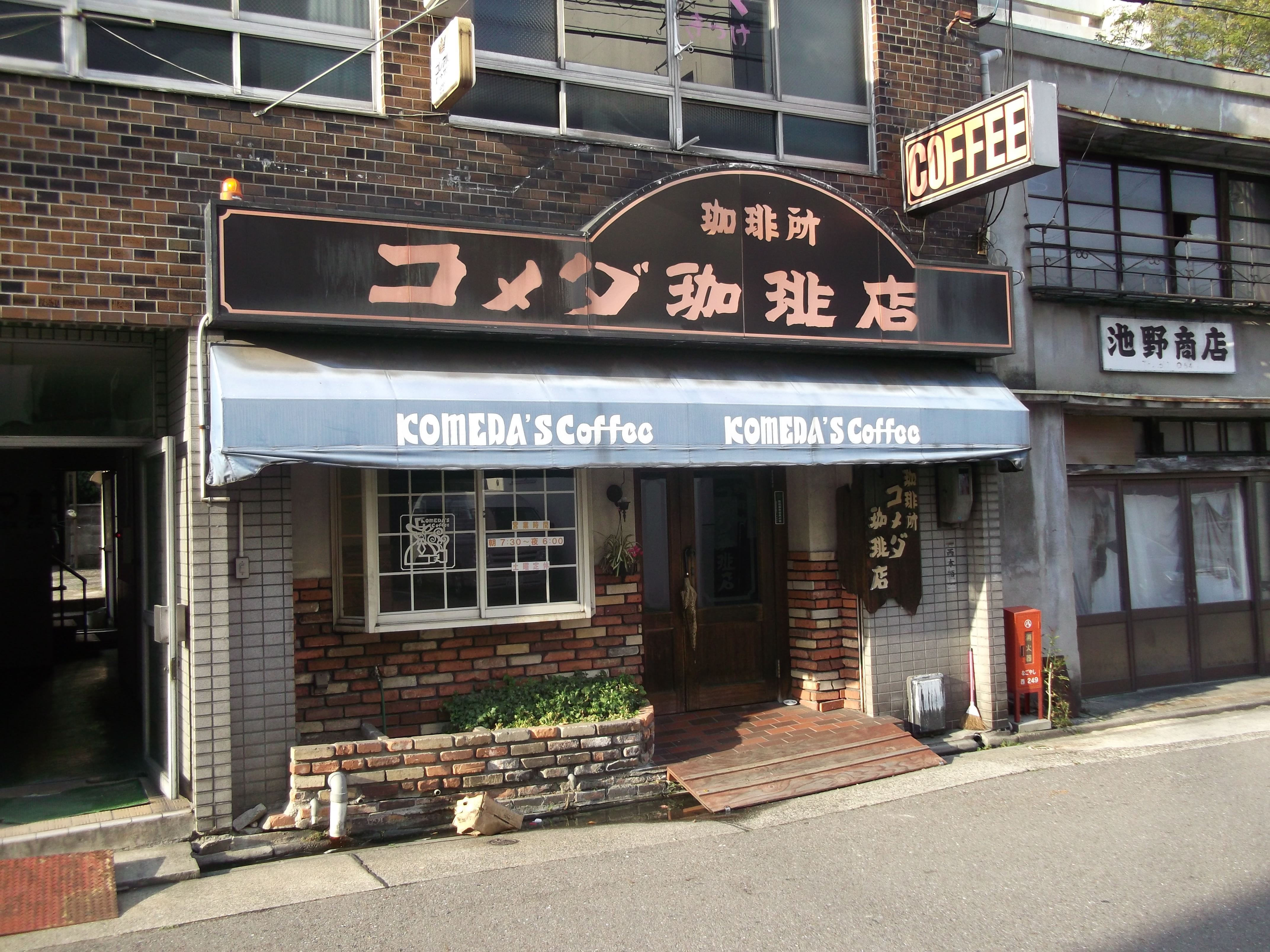 名古屋市西区那古野二丁目の菊井ビル1階にあったコメダ珈琲店1号店である菊井店。撮影日の前日をもって営業は終了している。